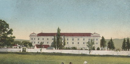 Scanul unei ilustrate din 1918